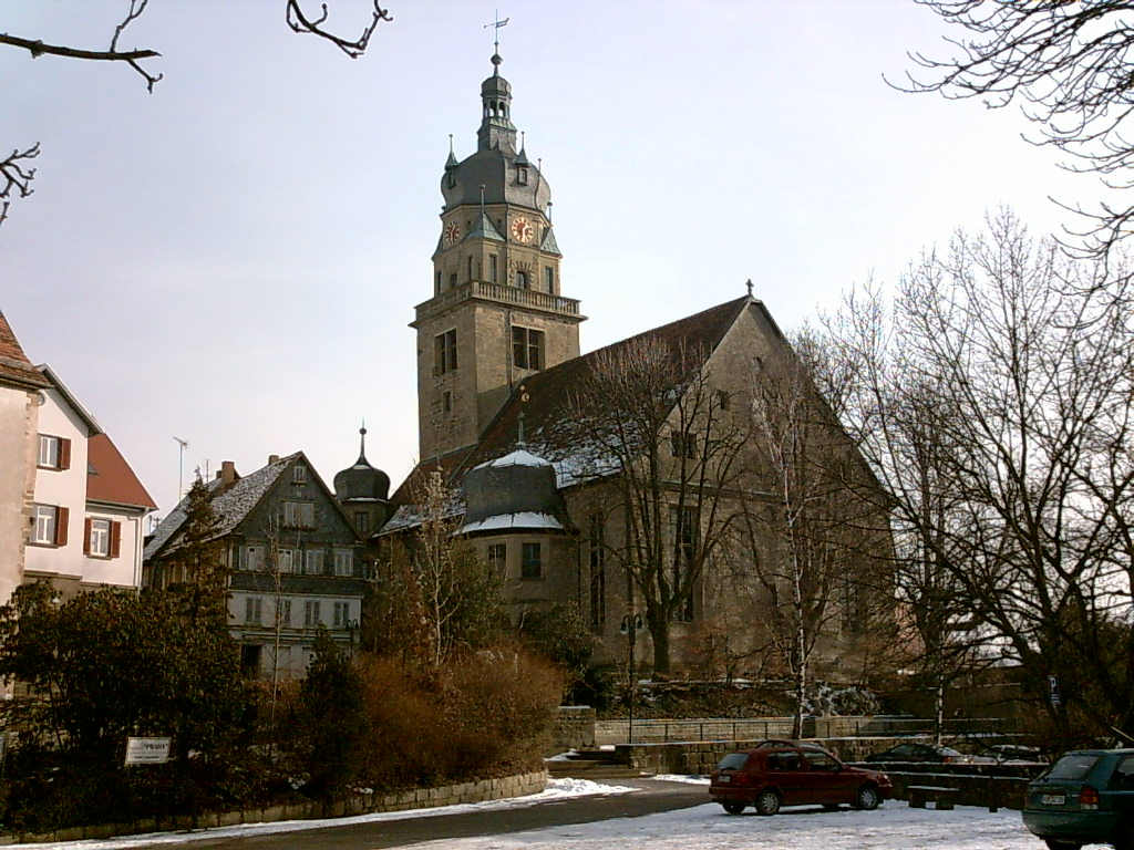 Kirche in Neuenstein (Hohenlohe), selbst fotografiert, Januar 2006